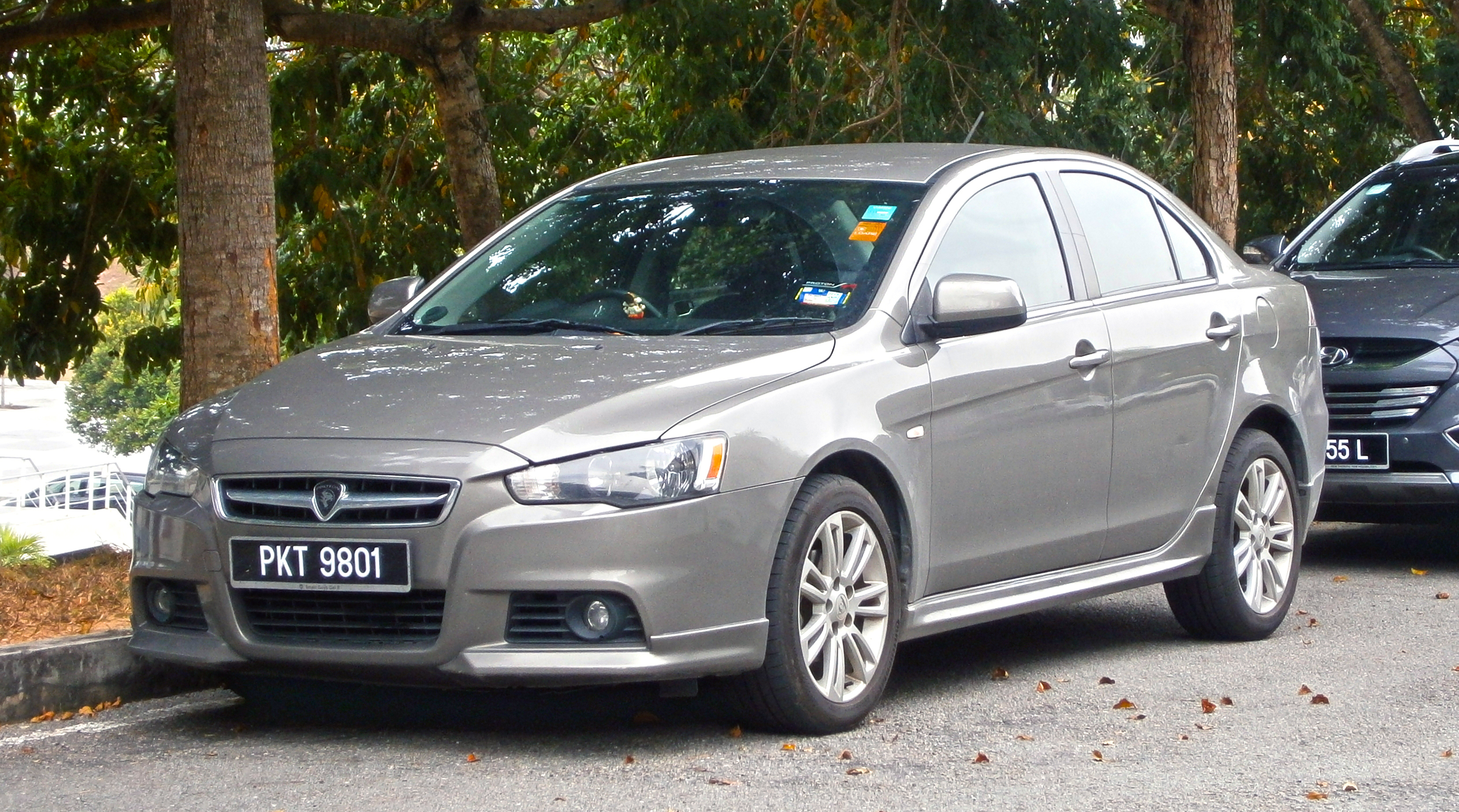 2012 Proton Inspira 2.0 Premium 4-door sedan